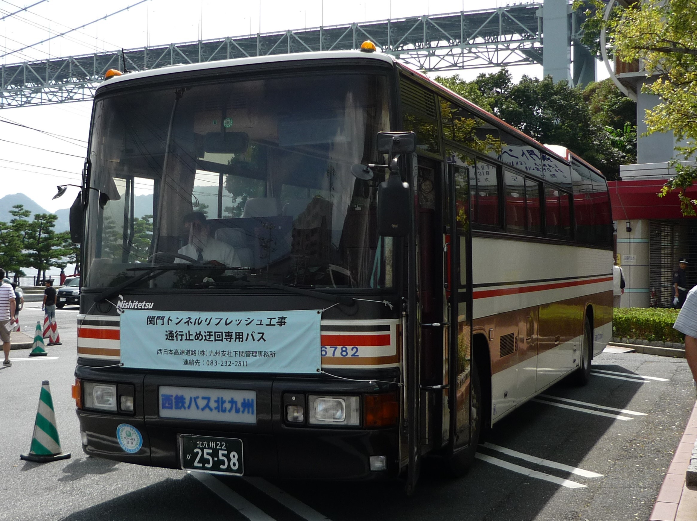 関門トンネル人道リフレッシュ工事対応の代行バス（2009年10月） Panasonic Lumix DMC-FS3